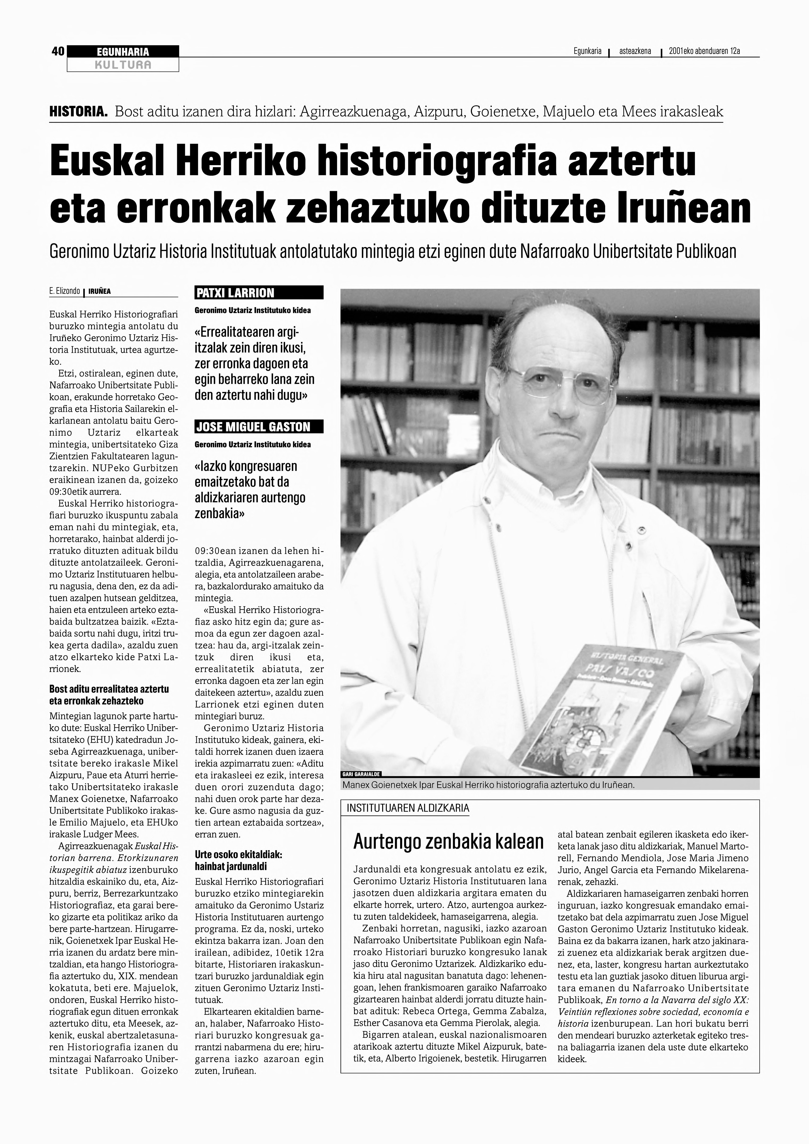 Manex Goienetxe, historialaria liburu bat aurkezten. (Euskaldunon Egunkaria, 2001)